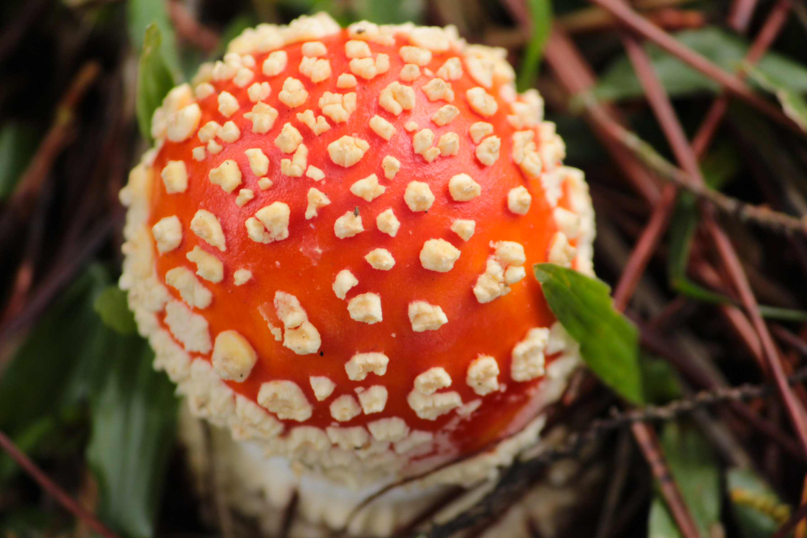 Cogumelos psicoativos alucinógenos encontrados em algumas épocas do ano na Vegetação da Serra em lugares de maior umidade - Serra de São Domingos no Município de Poços de Caldas - MG